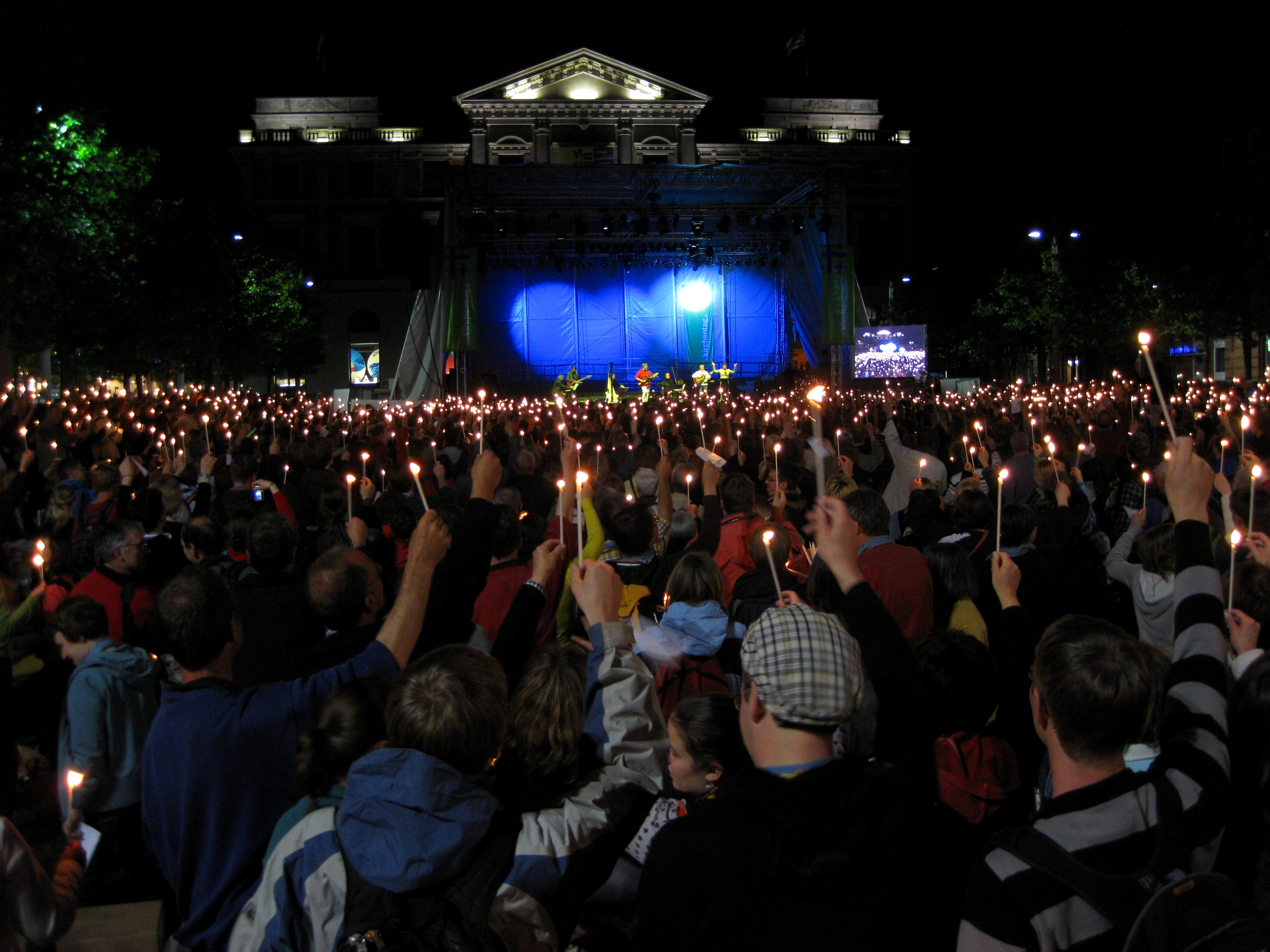 Abendsegen beim 32. Deutschen Evangelischen Kirchentag in Bremen vor dem Gebäude des Überseemuseums